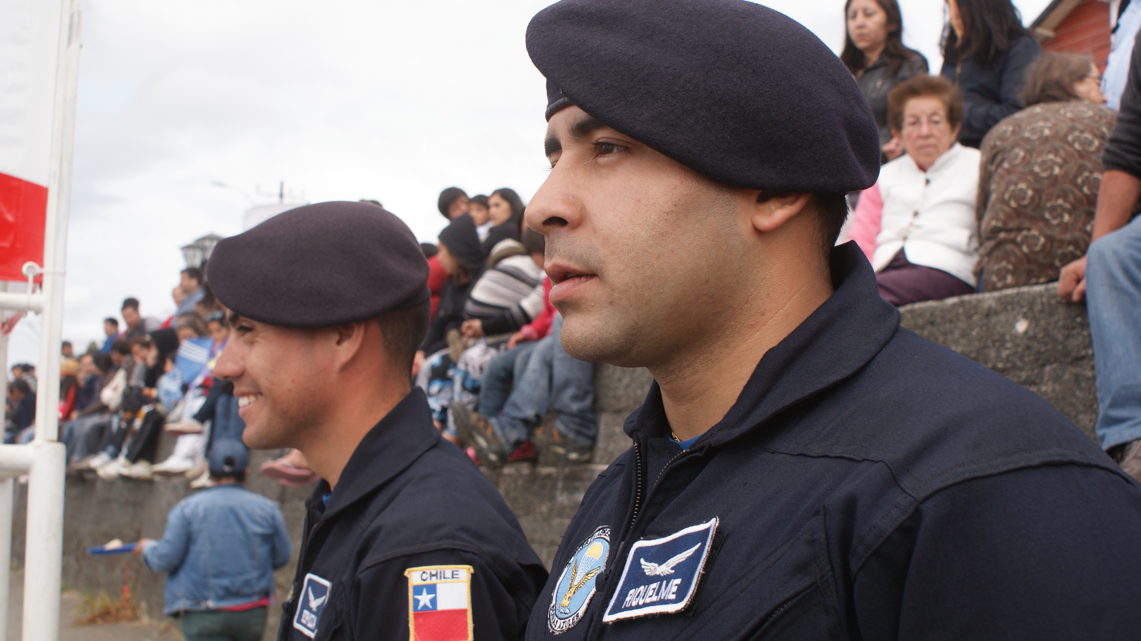 Paracaidistas Boinas Azules FACH, portando su boina distintiva.